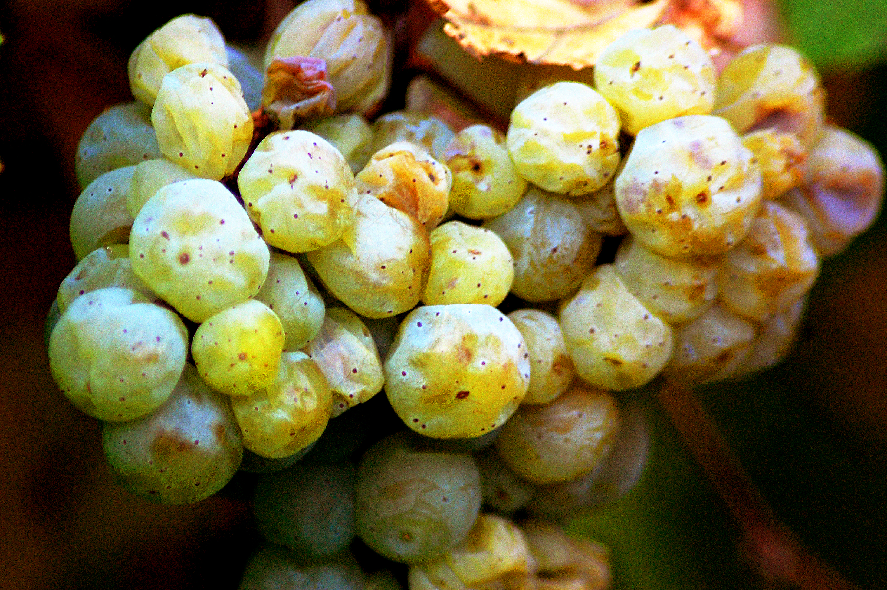 Grüner Veltliner grapes from Austria